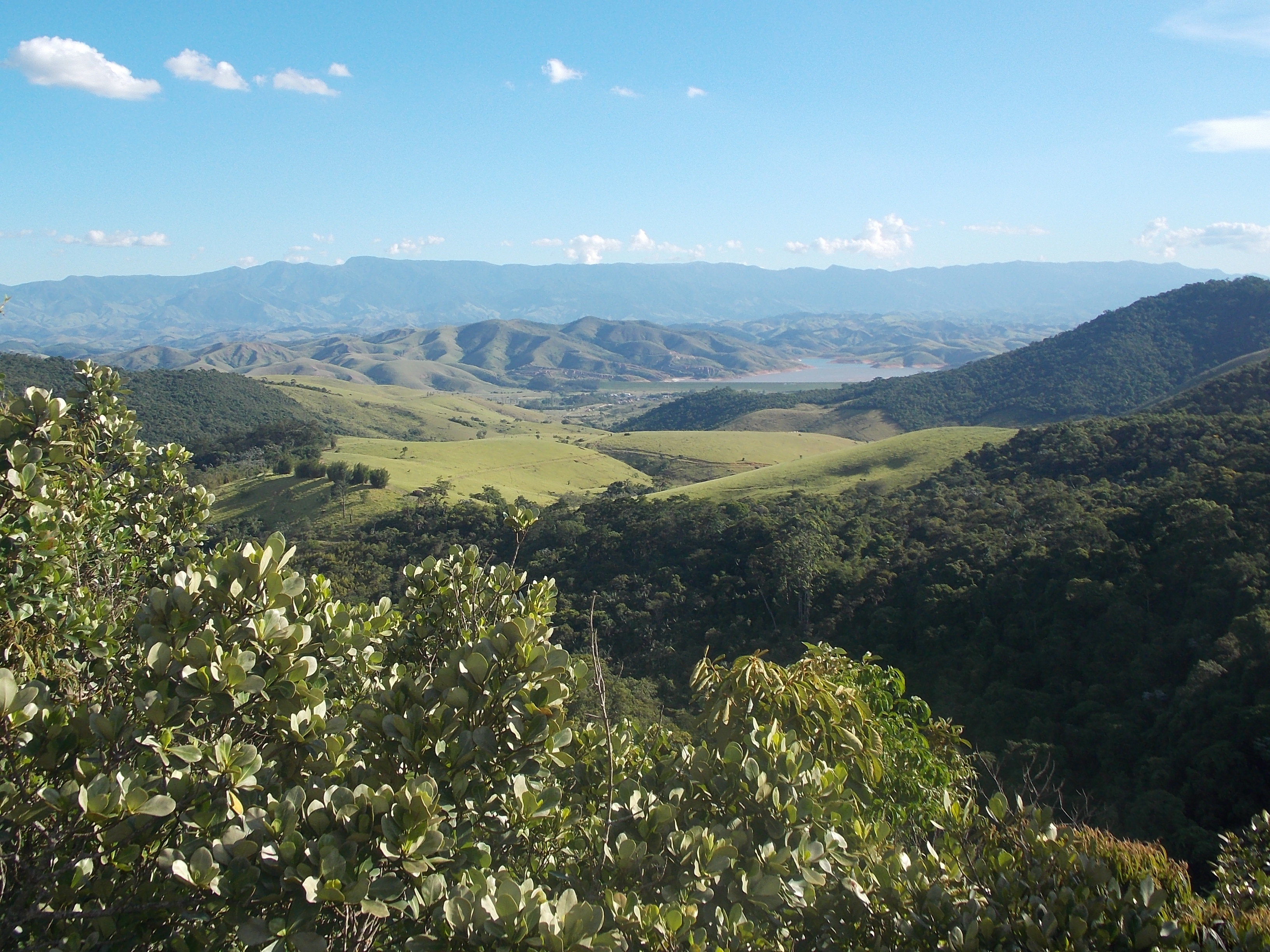 Em meio ao verde da natureza, eis que o belo céu azul veio a brilhar. Perfeição!